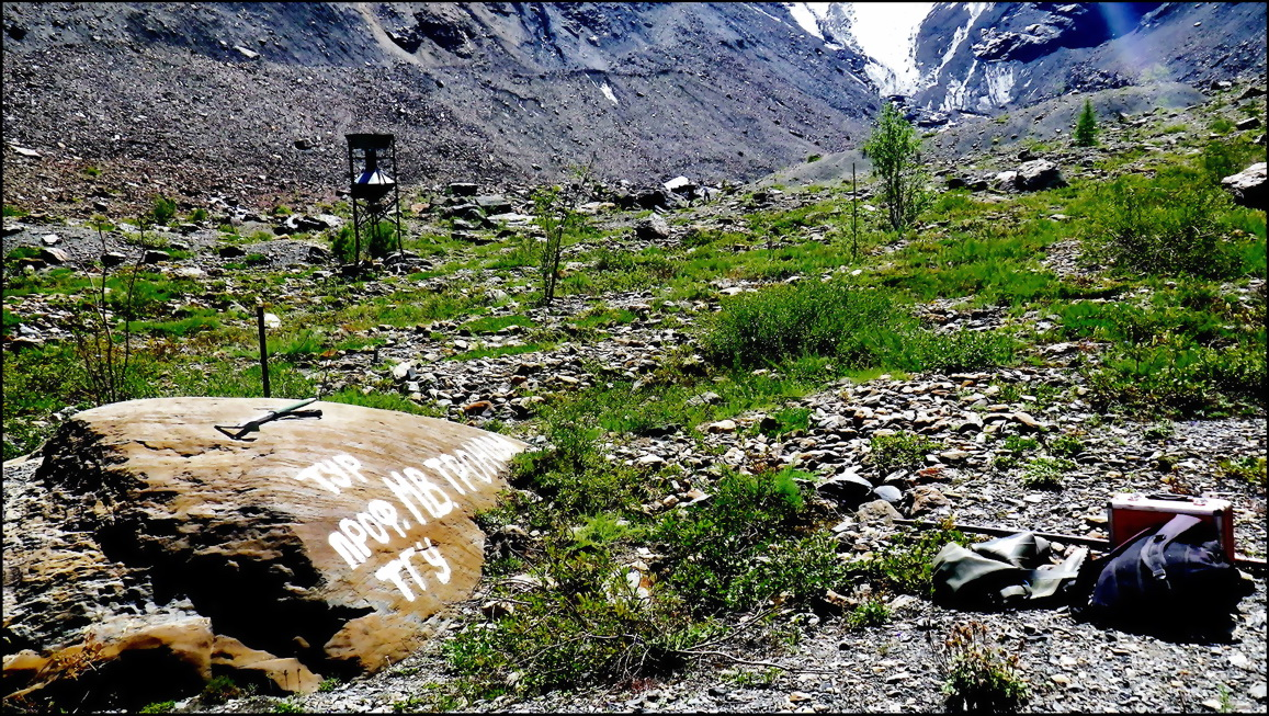 Тур профессора ТГУ М.В. Тронова, установленный в долине у конца ледника Малый Актру в 1936 году.